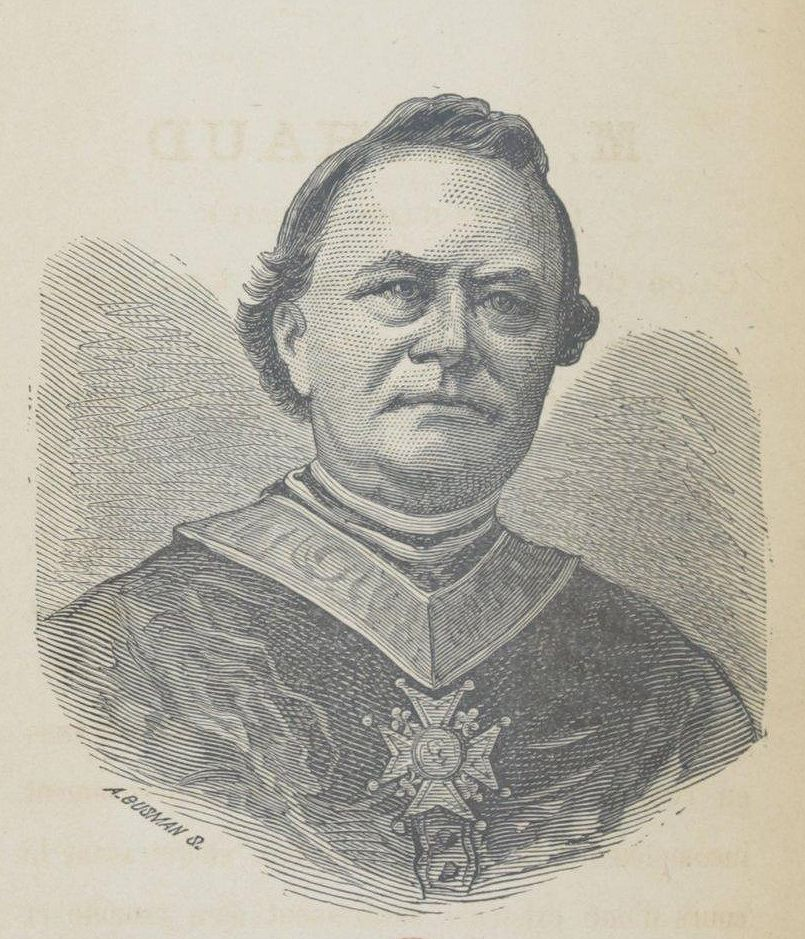 Jacques Julien Auguste Arthaud (16 janvier 1809 - 30 avril 1877), curé de Notre-Dame de Longpont du 16 avril 1843 à sa mort.